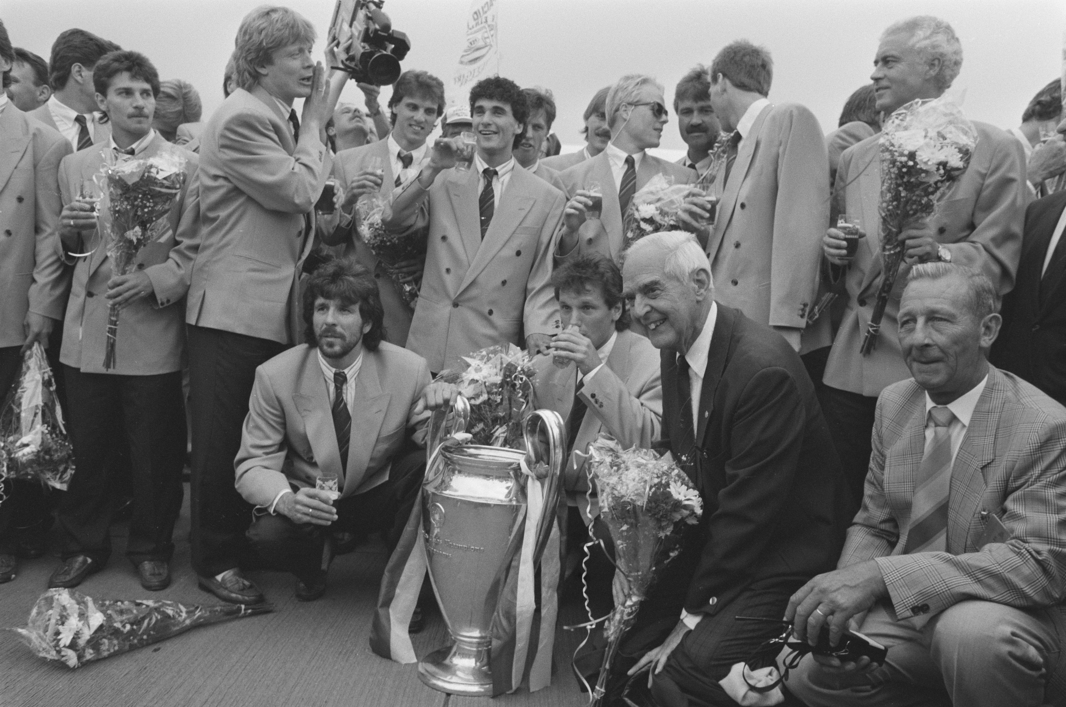 Collectie / Archief : Fotocollectie Anefo Reportage / Serie : [ onbekend ] Beschrijving : Aankomst PSV met Europa Cup I op vliegveld Eindhoven; ir. Frits Philips en PSVers met beker Datum : 26 mei 1988 Locatie : Eindhoven Trefwoorden : sport, voetbal Instellingsnaam : PSV Fotograaf : Bogaerts, Rob / Anefo Auteursrechthebbende : Nationaal Archief Materiaalsoort : Negatief (zwart/wit) Nummer archiefinventaris : bekijk toegang 2.24.01.05 Bestanddeelnummer : 934-2545